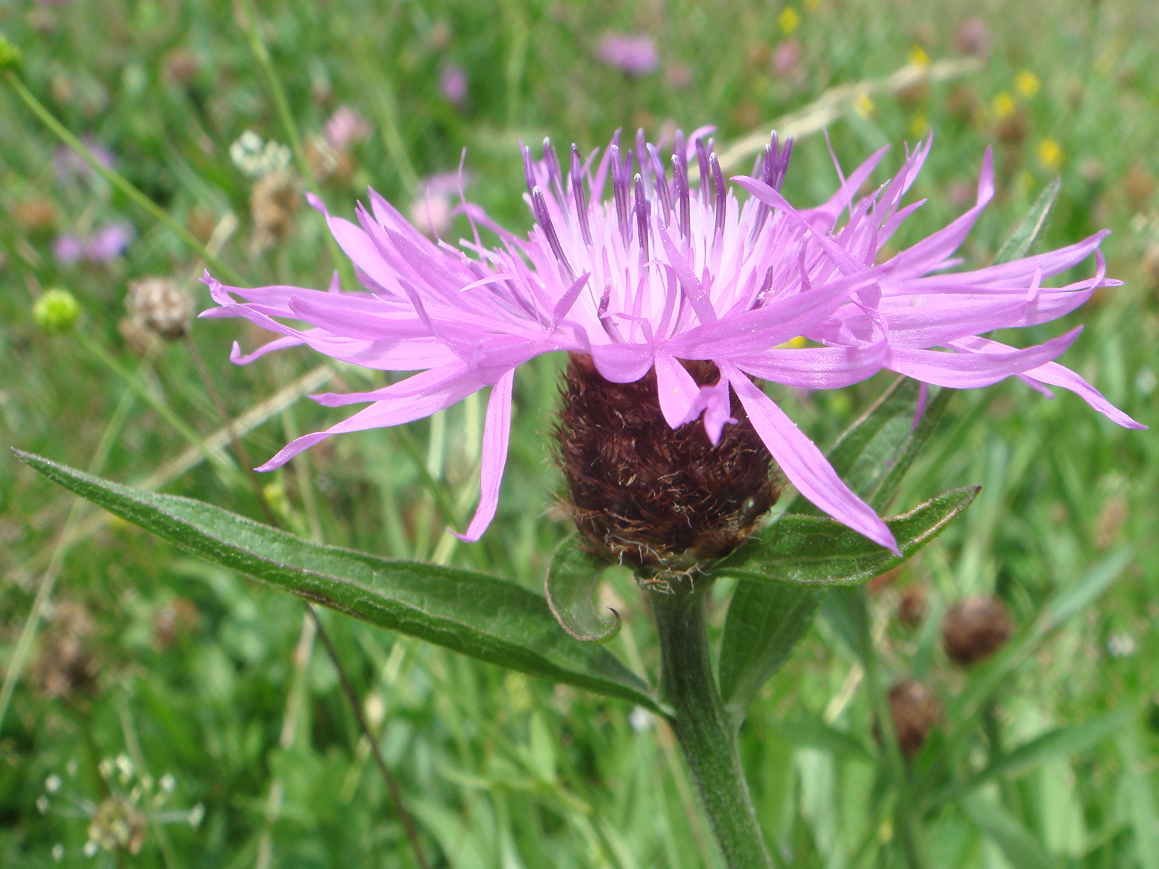 Centaurea nigra, Valle de Ordesa, Pirineos, (Huesca), España.